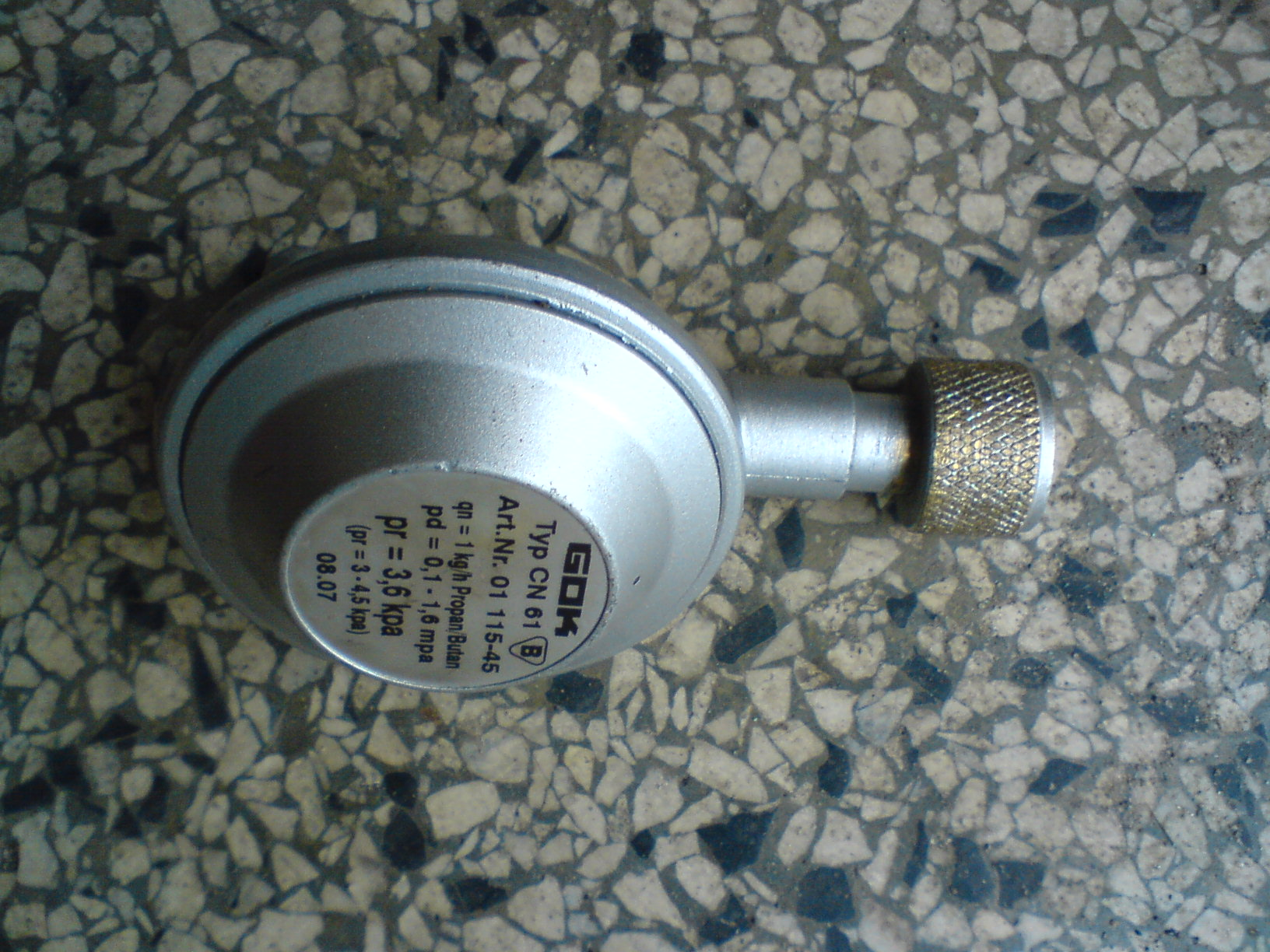 Parametry reduktora nienastawnego.